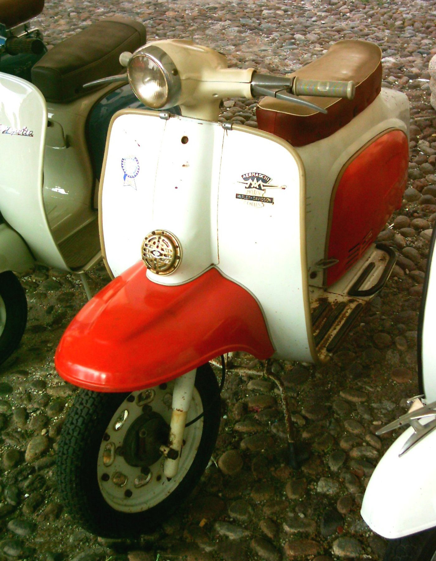 Aermacchi-Harley Davidson Brezza 150 del 1964 fotografato al Raduno Moto Storiche di Medole nel 2006